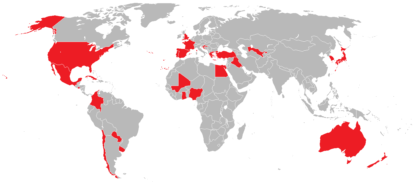 Selecciones clasificadas al Mundial Sub-20 Turquía 2013.